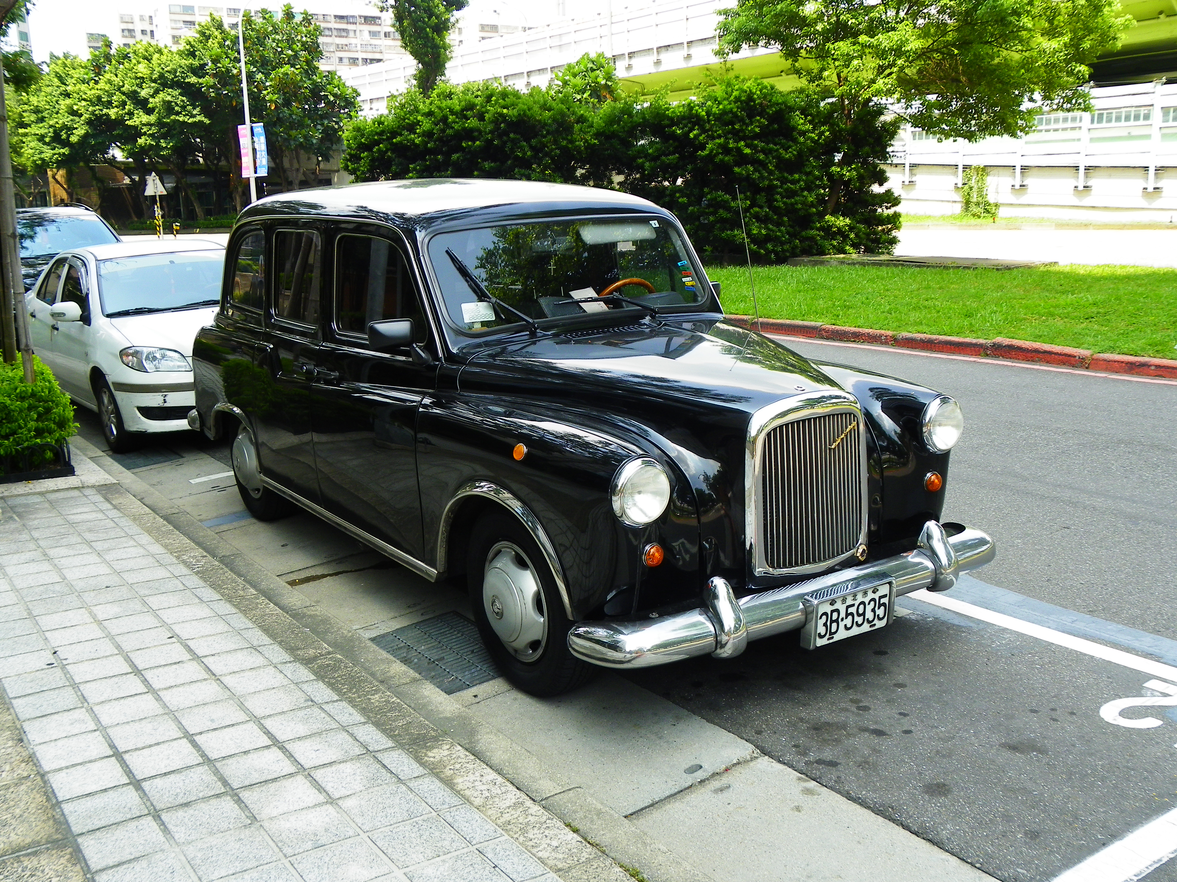 臺北市大安區建國南路一段與仁愛路三段路口的Austin FX4。